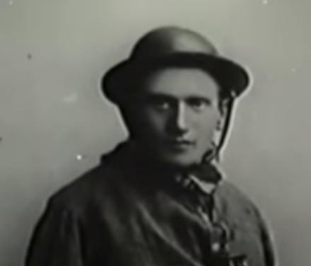 Dominicaner pater Georges Ceslas Rutten (1875-1952) in mijnwerkersuitrusting ; ca. 1899-1900